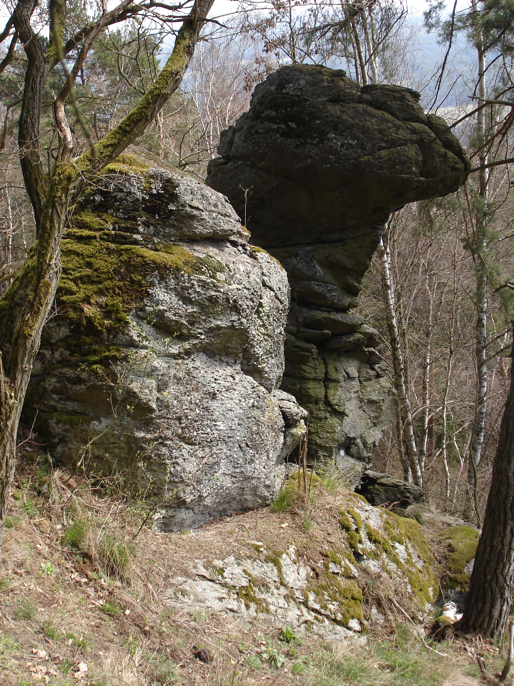 skalní věž